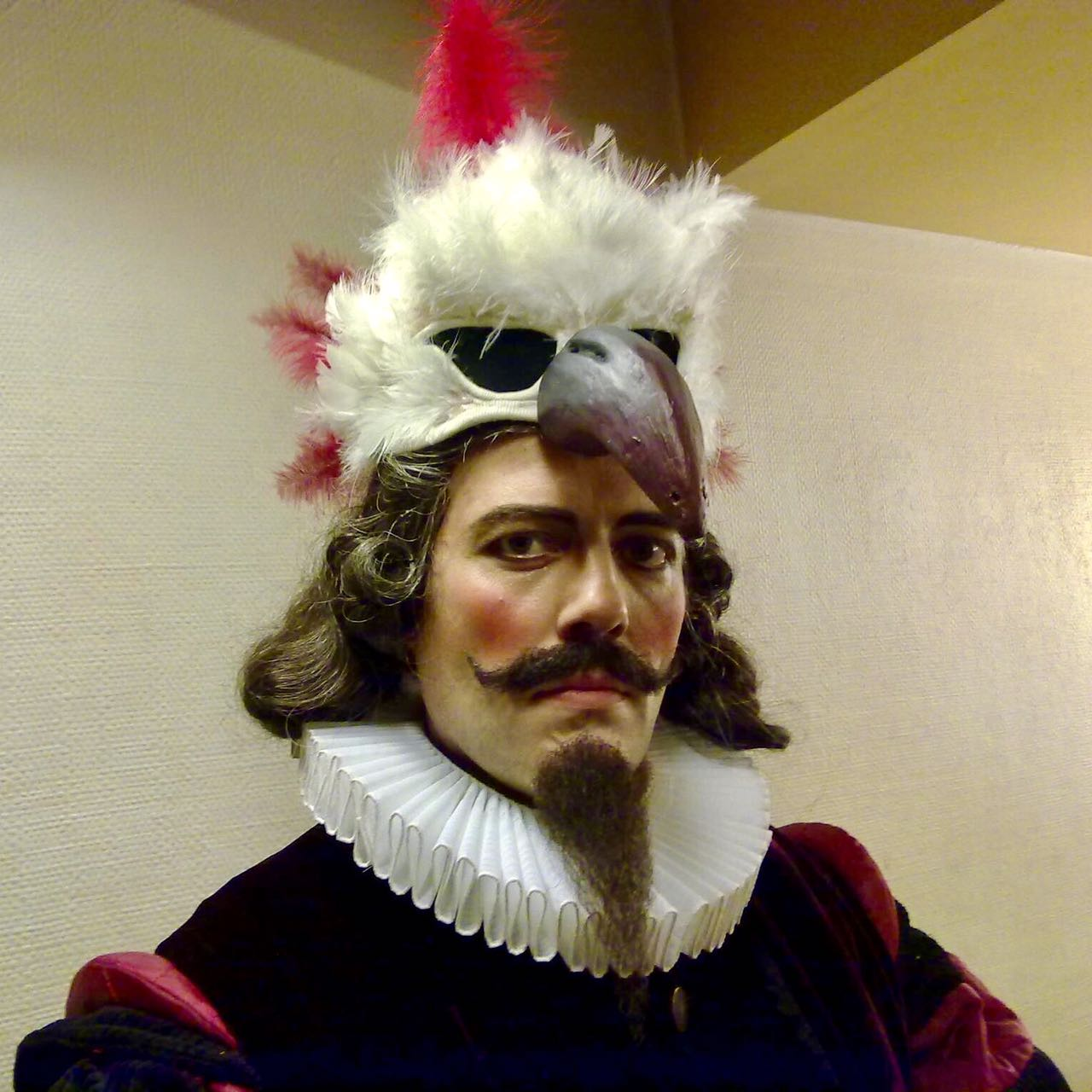 Leonardo Estévez como Ford de la opera Falstaff